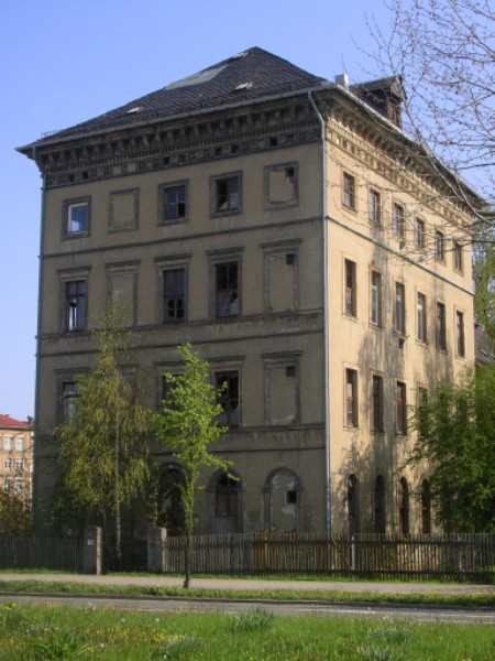 Aufnahme der ehemaligen Kattundruckmanufaktur Schüffner an der Müllerstraße in Chemnitz